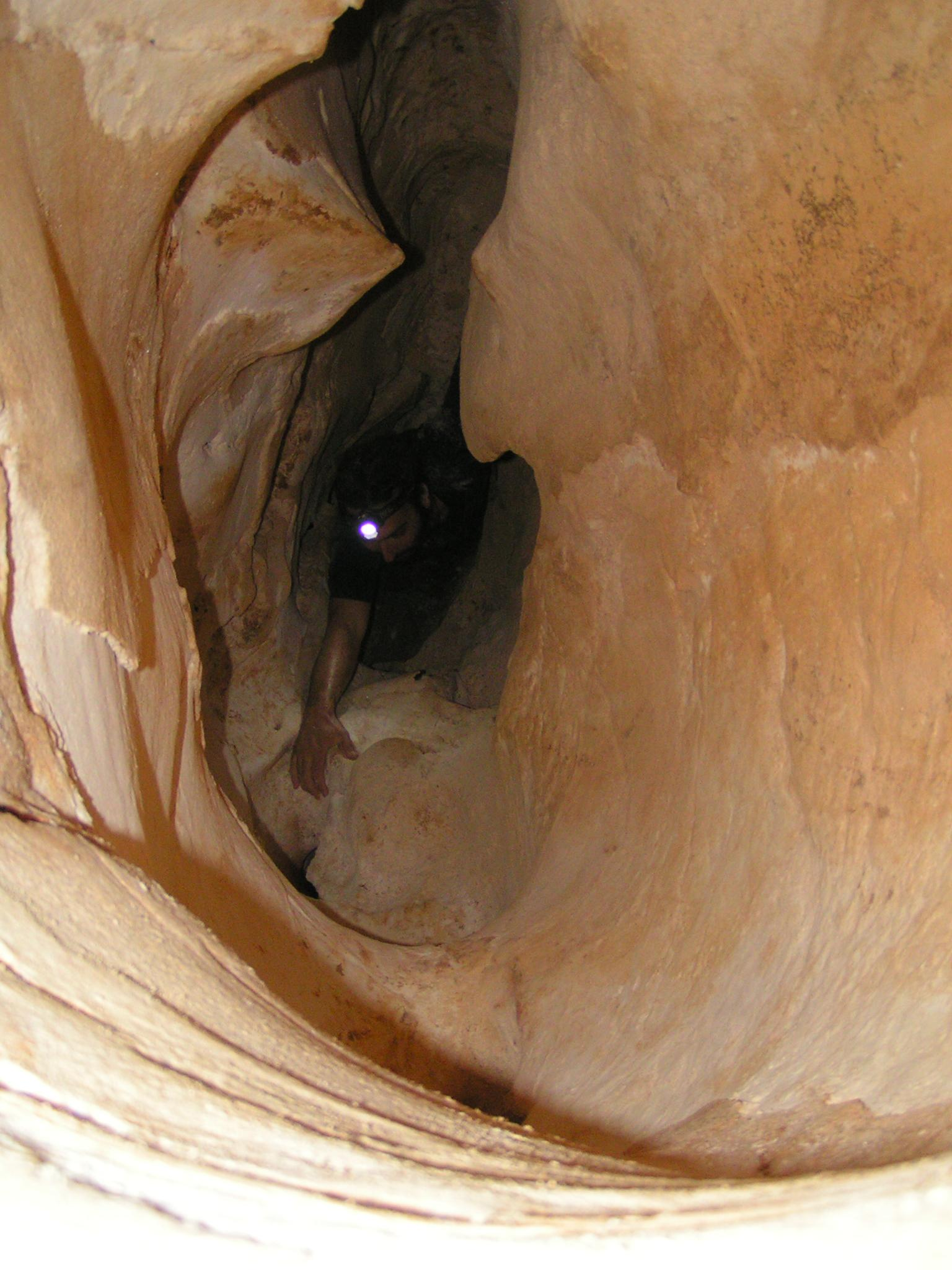 אחד מיני פירים רבים המקשרים בין המפלסים השונים במערה